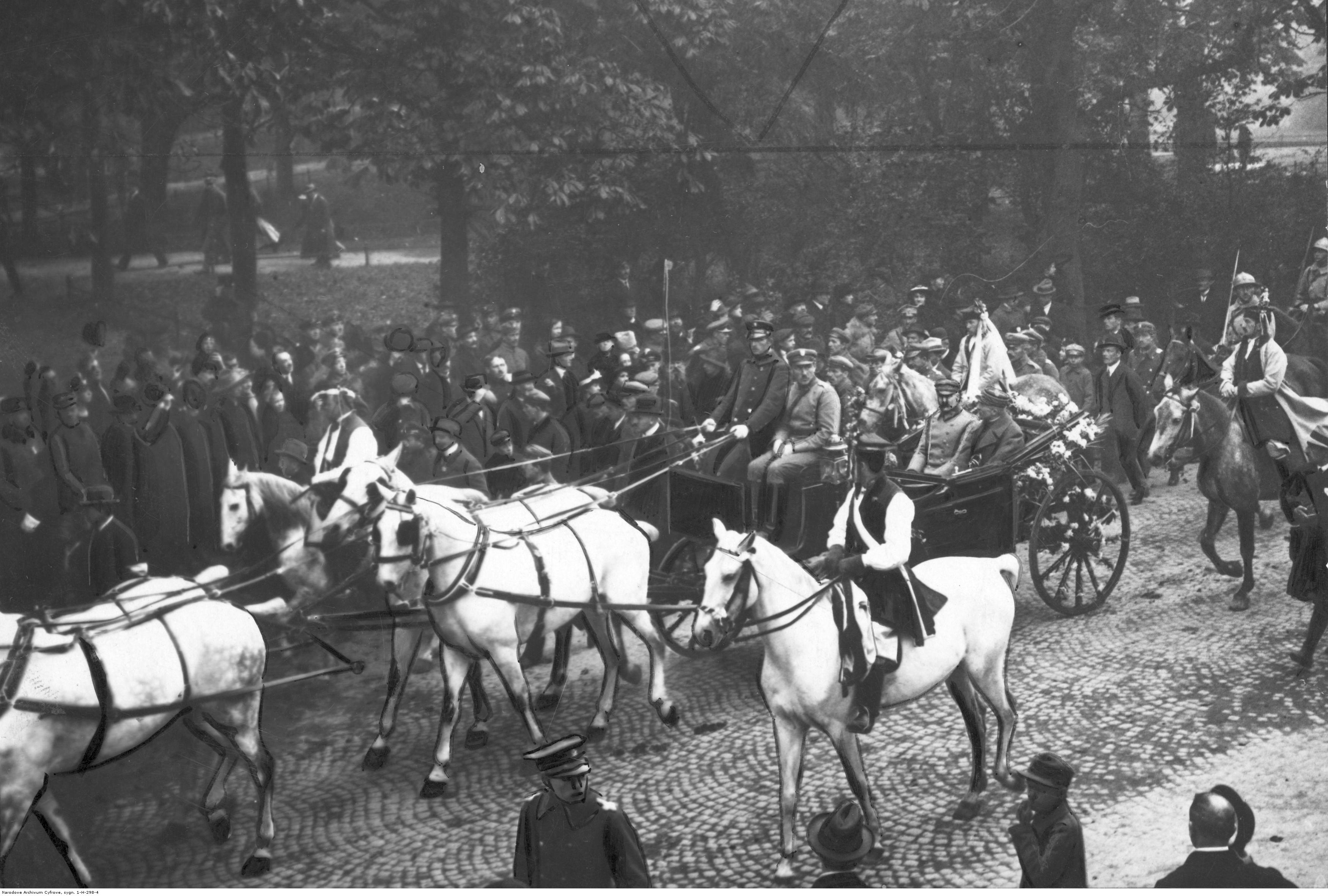 Święto Zjednoczenia Armii Polskiej. Naczelnik Państwa Józef Piłsudski w drodze na rewię na Błonie. Koncern Ilustrowany Kurier Codzienny - Archiwum Ilustracji. Sygnatura: 1-H-298-4